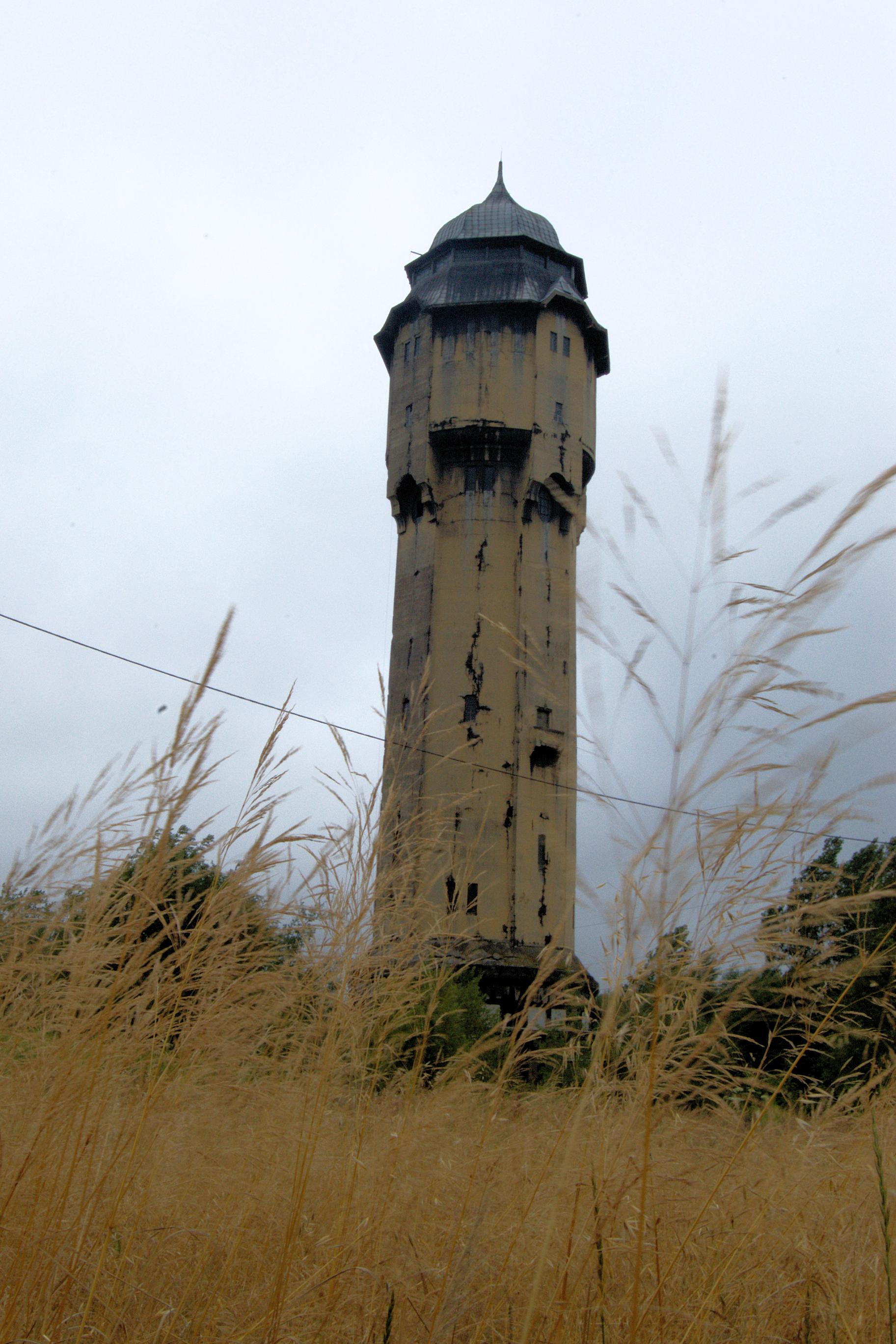 Zabytkowa secesyjna wieża wodna przy ul. J. Korczaka w Katowicach, wzniesiona w 1912 według projektu Jerzego i Emila Zillmannów z 1907; została wpisana wraz z działką nr 1246/31 do rejestru zabytków 29 października 1990 (nr rej.: A/1418/90, nr hip. 3−144 Roździeń). Wieża została uwieczniona w filmie Kazimierza Kutza Sól ziemi czarnej.